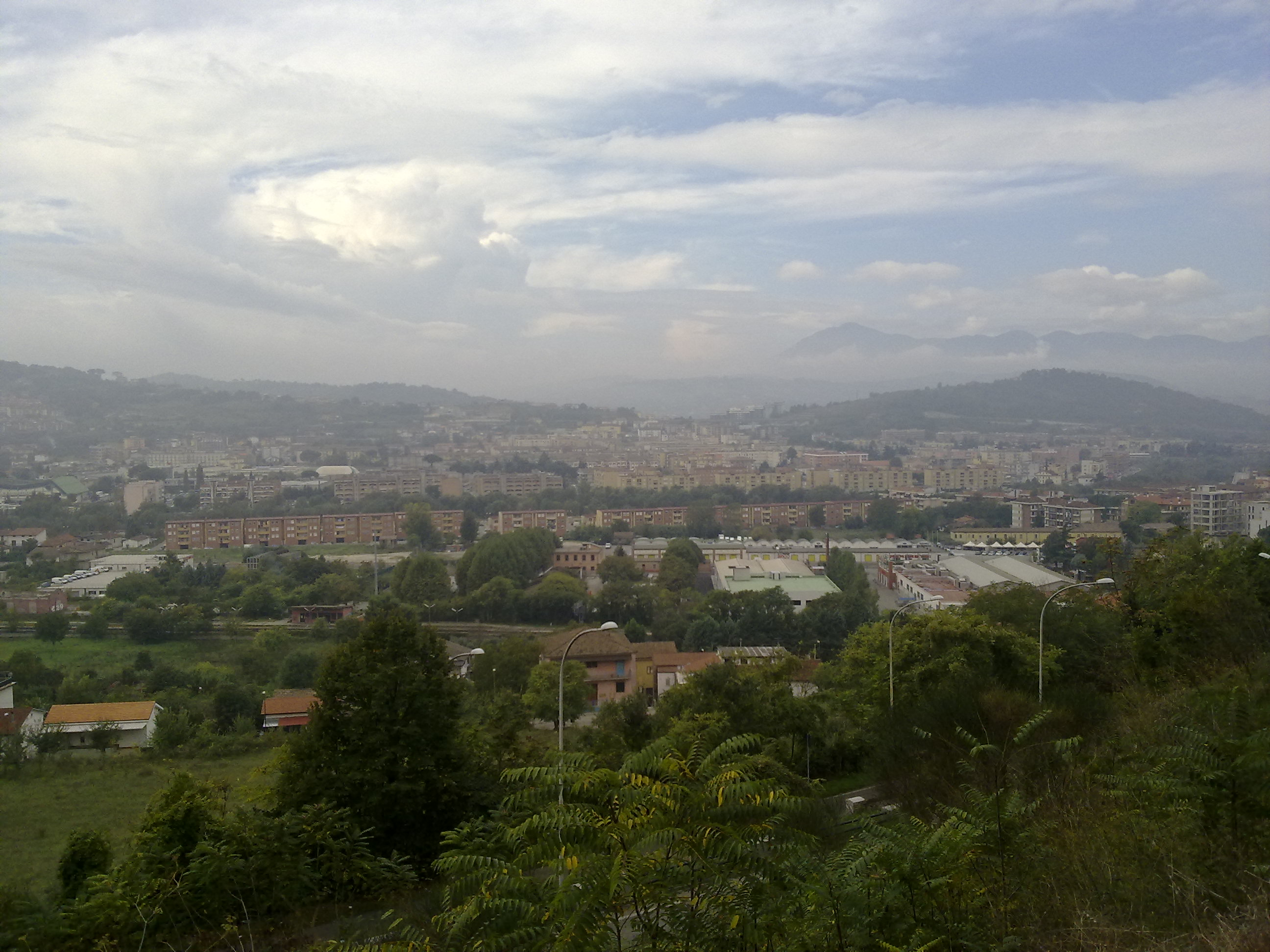 L'autore è Francesco M. Mazza che propone una veduta del Rione Libertà di Benevento.